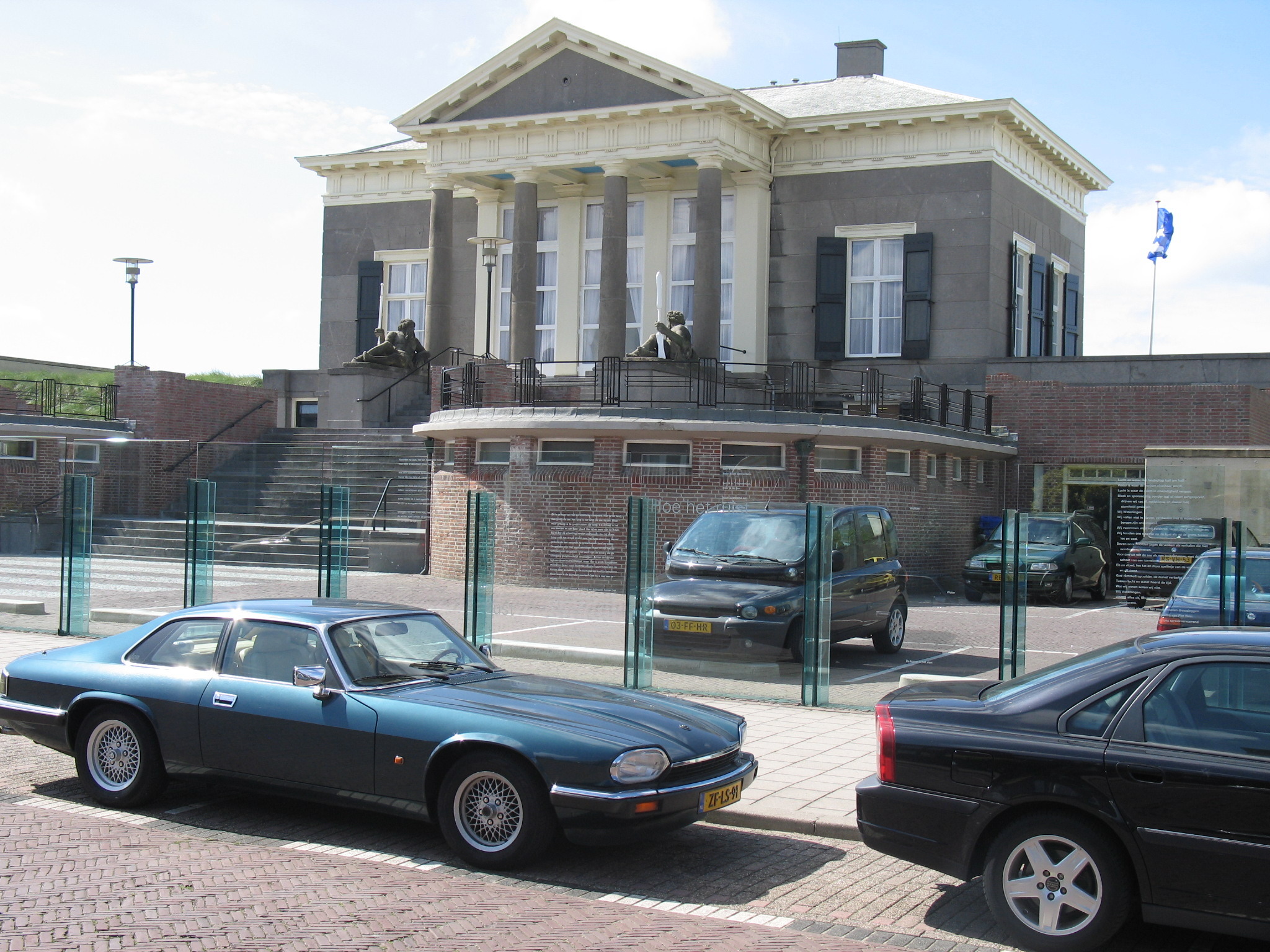 Paviljoen Von Wied, Scheveningen Museum Beelden aan Zee